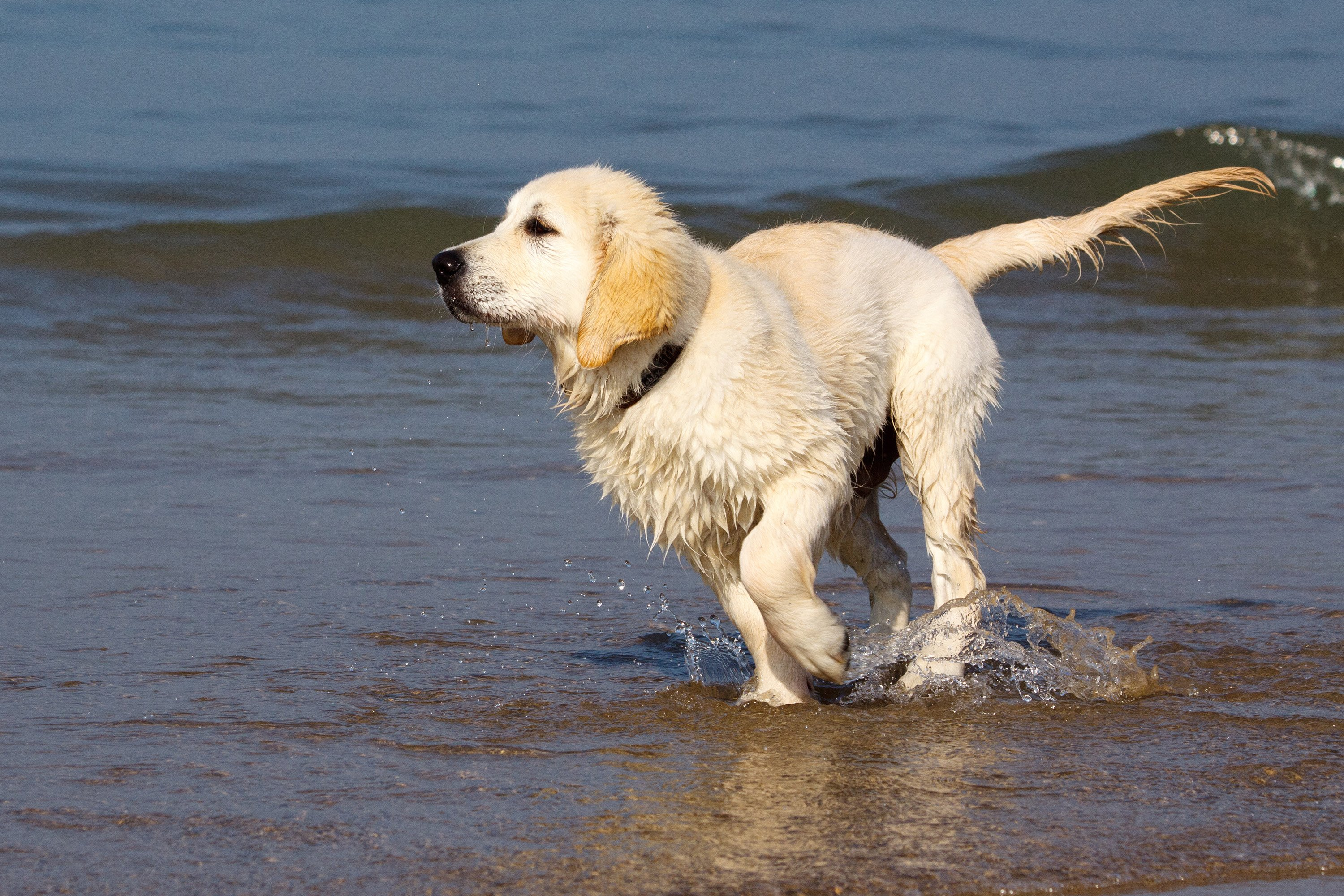 Golden Retriever Welpe/Junghund in der Nordsee (Scheveningen, Den Haag, Niederlande)